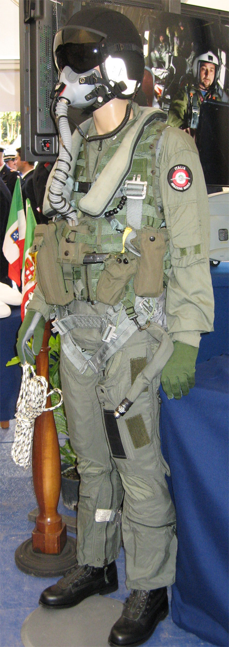 Tenuta di volo di un pilota dell'aviazione imbarcata della Marina Militare Italiana. Foto scattata in occasione della Festa delle Forze Armate. Il modello era in esposizione pubblica al circo Massimo (Roma).